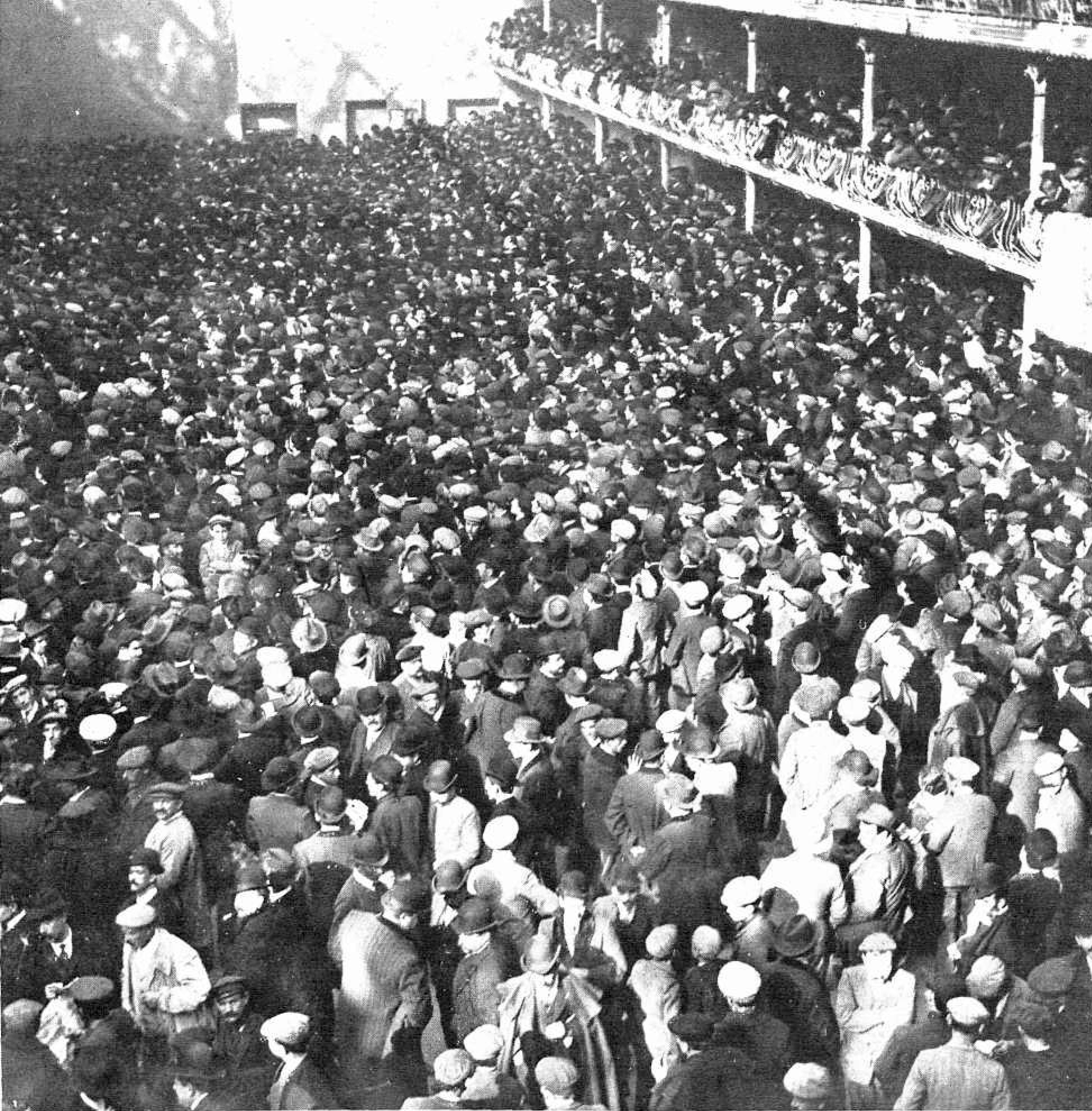 El mitin del domingo en Jai Alai.